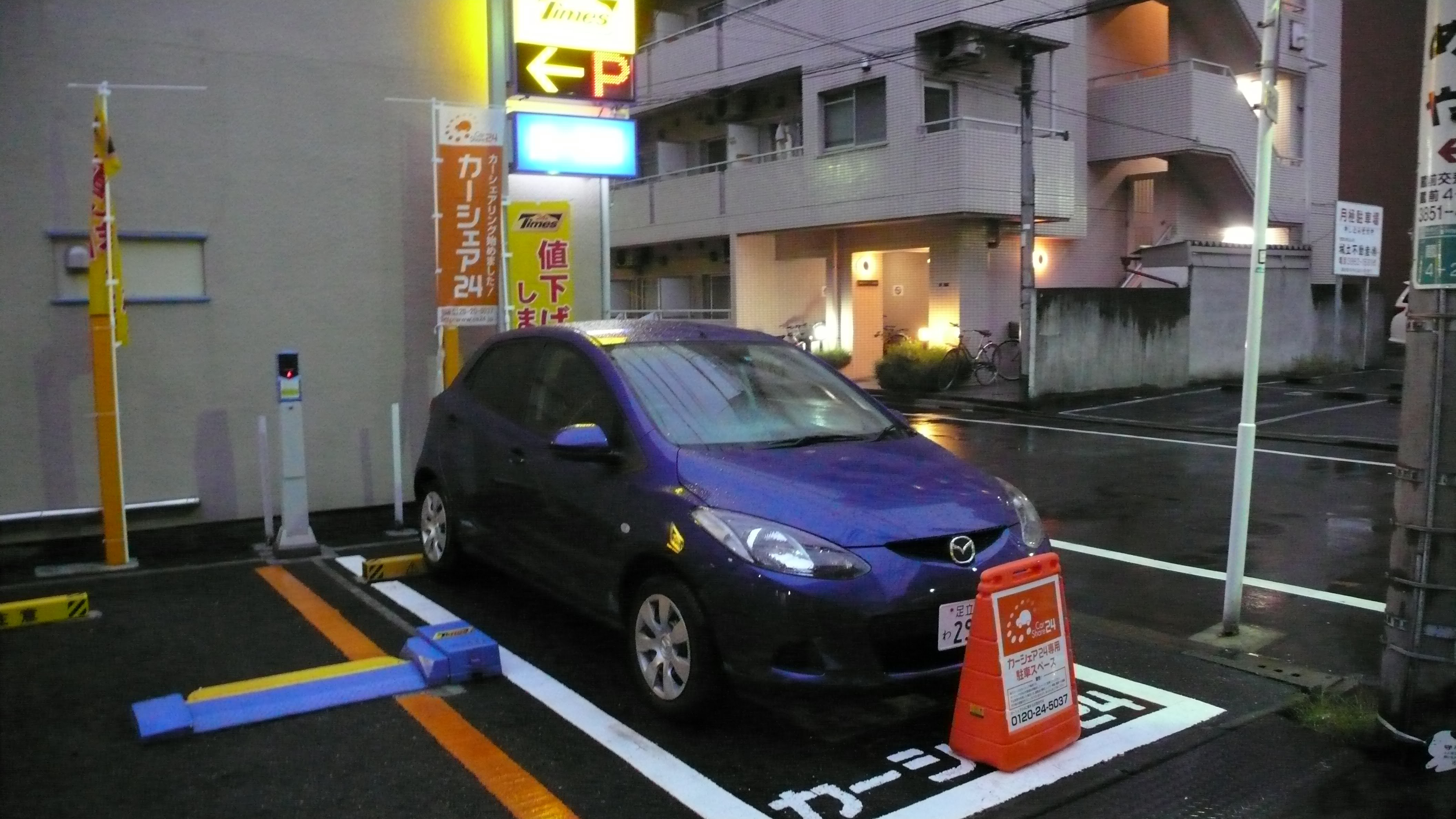 マツダレンタカー運営 カーシェア24 旧タイムズ蔵前4丁目駐車場